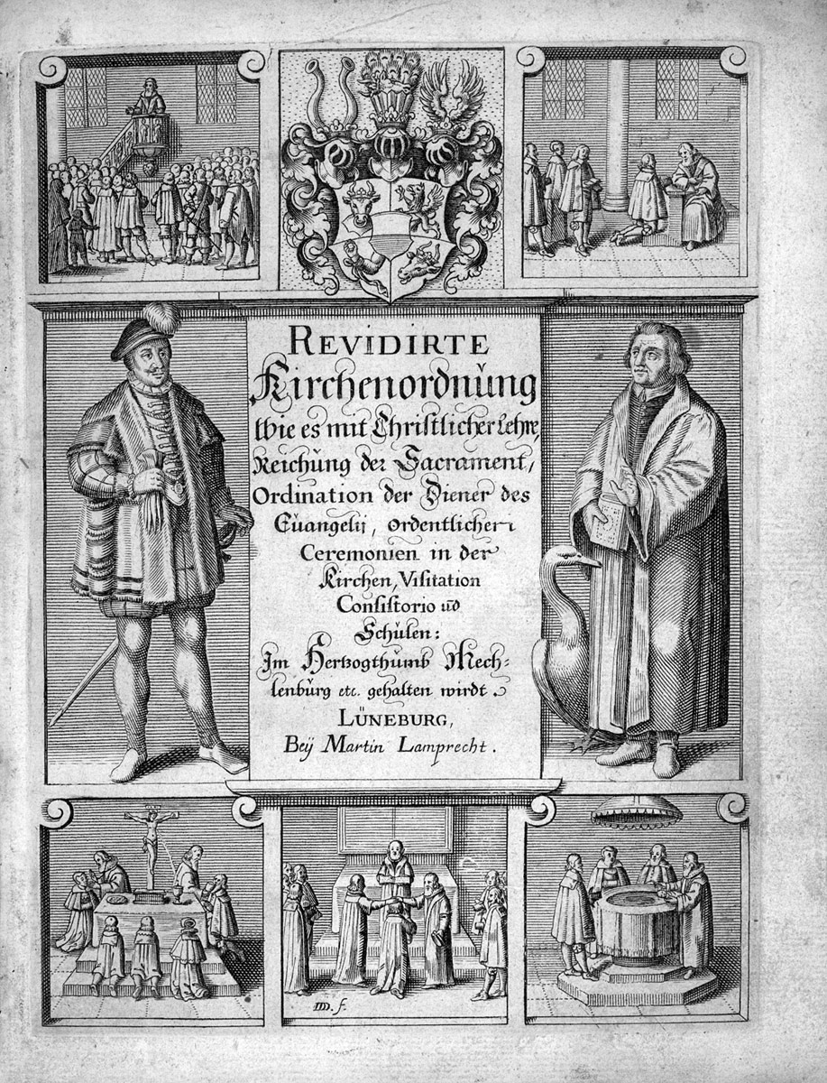 Revidirte Kirchen-Ordnung, wie es mit Christlicher Lehre, Reichung der Sacramenten, Ordination der Diener des Evangelii, ordentlichen Ceremonien in der Kirchen, Visitation, Consistorio und Schulen: Im Herzogthumb Mecklenburg etc. gehalten wird, Lüneburg, Martin Lamprecht 1650.